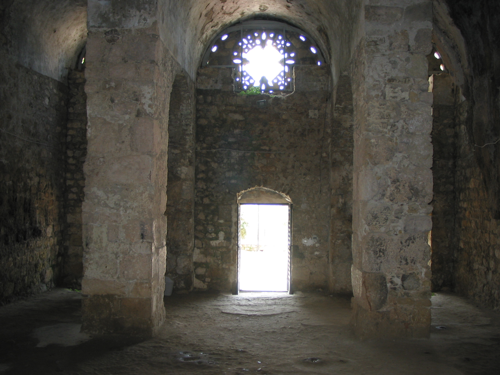 Saint Pierre Church in Antioch. Saint Pierre Kilisesi, Antakya. 22/05/2003 Onur Volkan Hatem